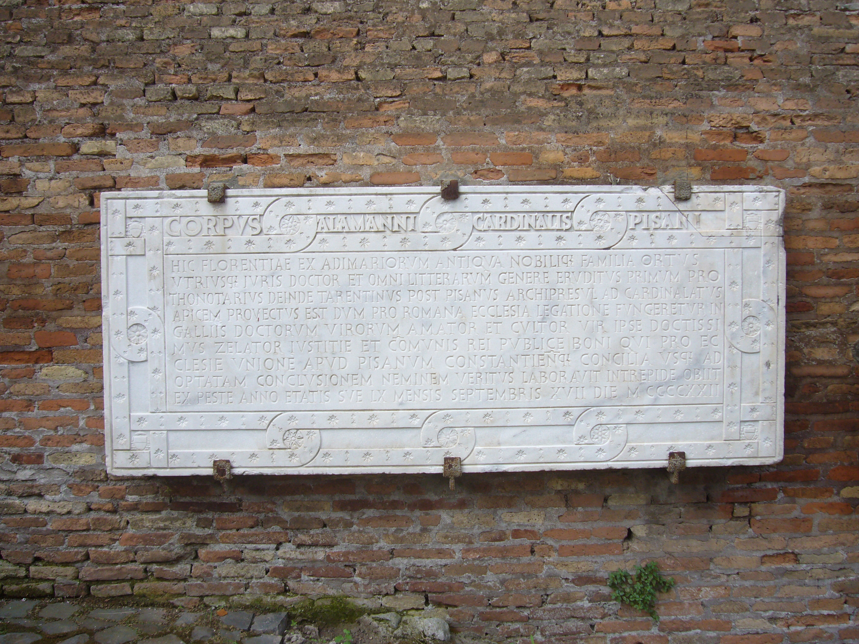 Roma, S. Francesca Romana al Foro. Lapide di Alamanno Adimari, cardinale pisano, morto di peste nel 1422.